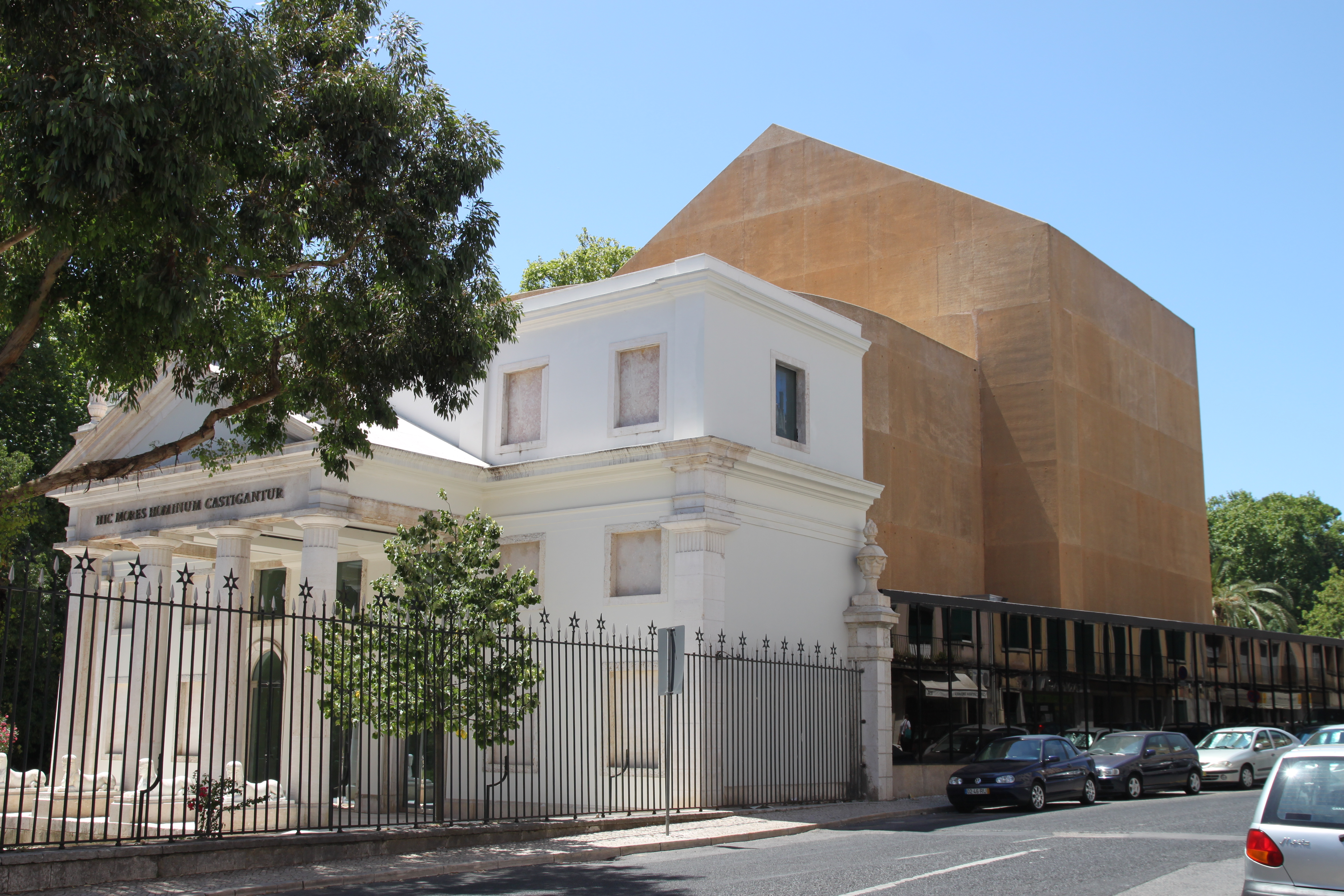 Vista geral do Teatro Thalia